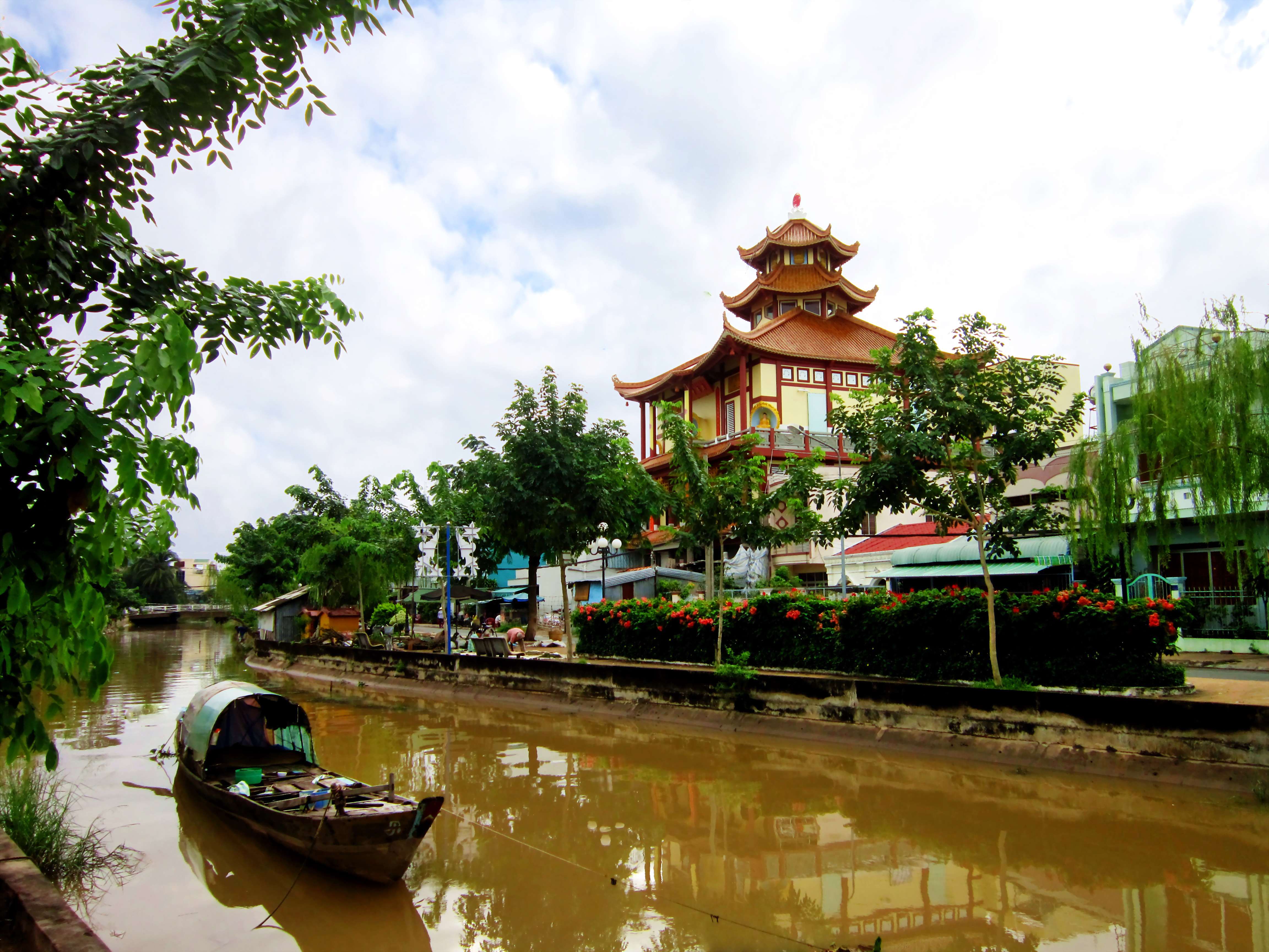 Rạch Cái Sơn, đoạn ở bên đường Phan Bội Châu, thành phố Sa Đéc, tỉnh Đồng Tháp, Việt Nam.